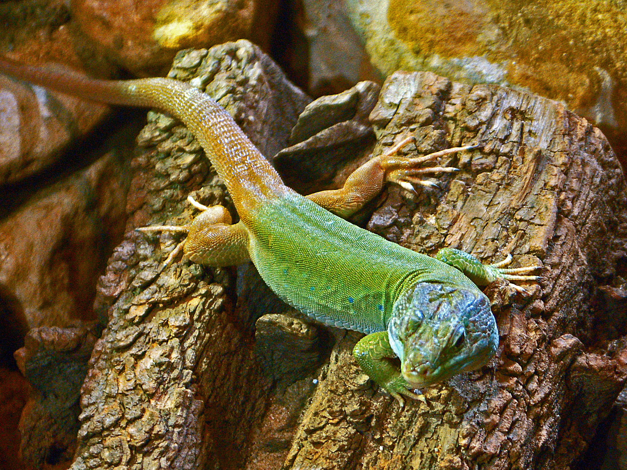 Timon tangitanus at the Prague Zoo